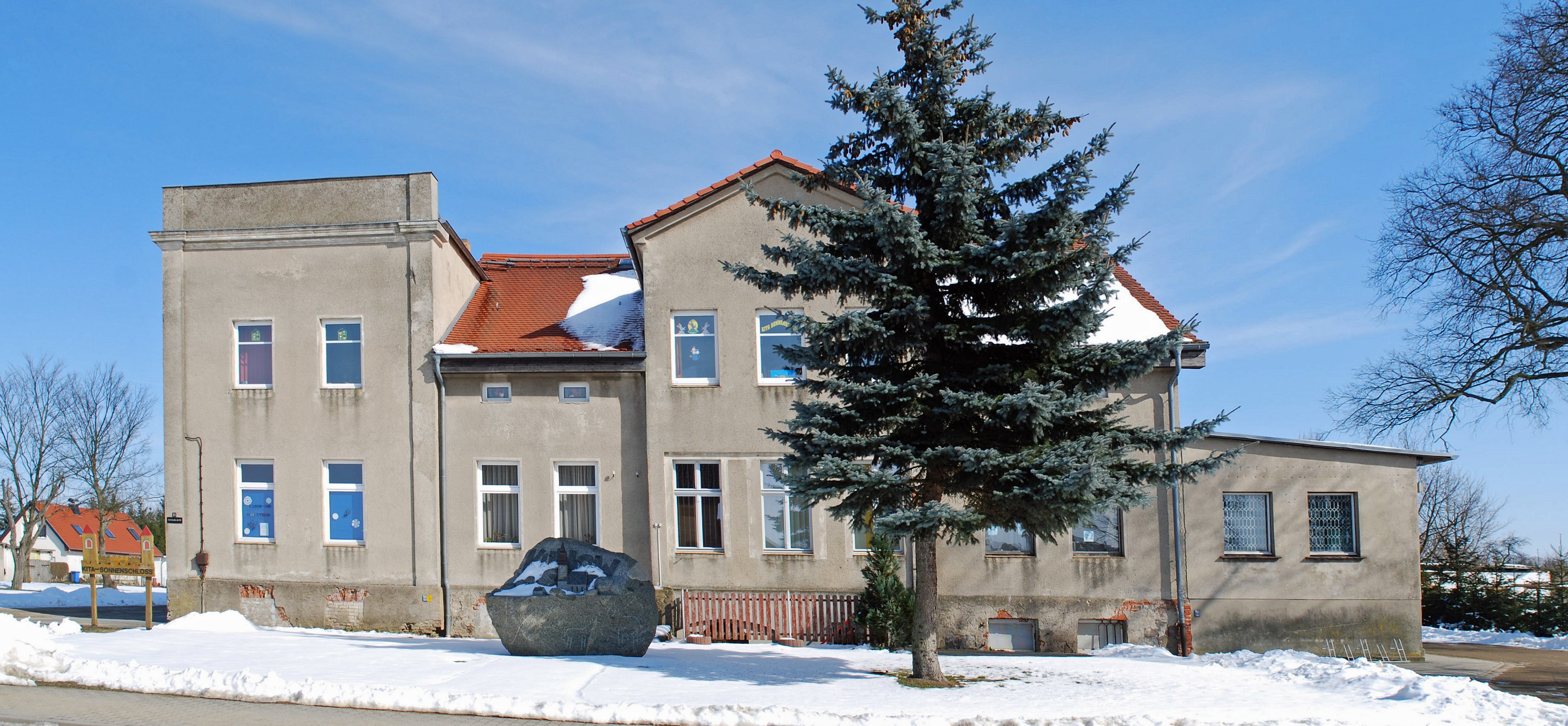 Gebäude und Denkmal in der Uckermark. (Altkreis Angermünde)